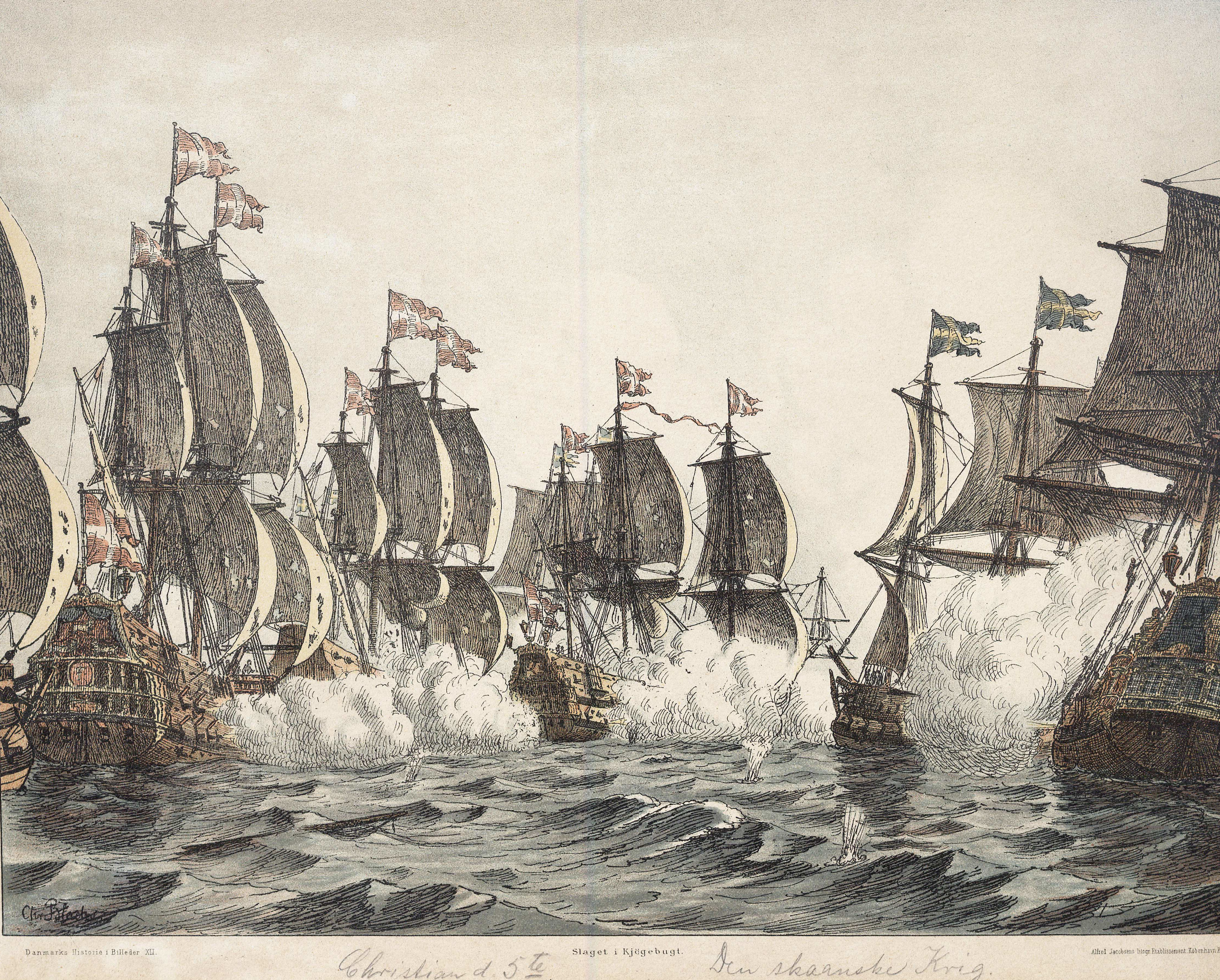 Søslag under den skånske krig, 1677. (Chr. Blache, 1838 - 1920)